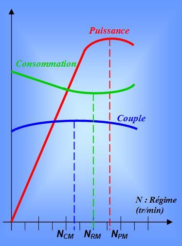 Allures des Courbes de couple puissance et consommation des moteurs thermiques.